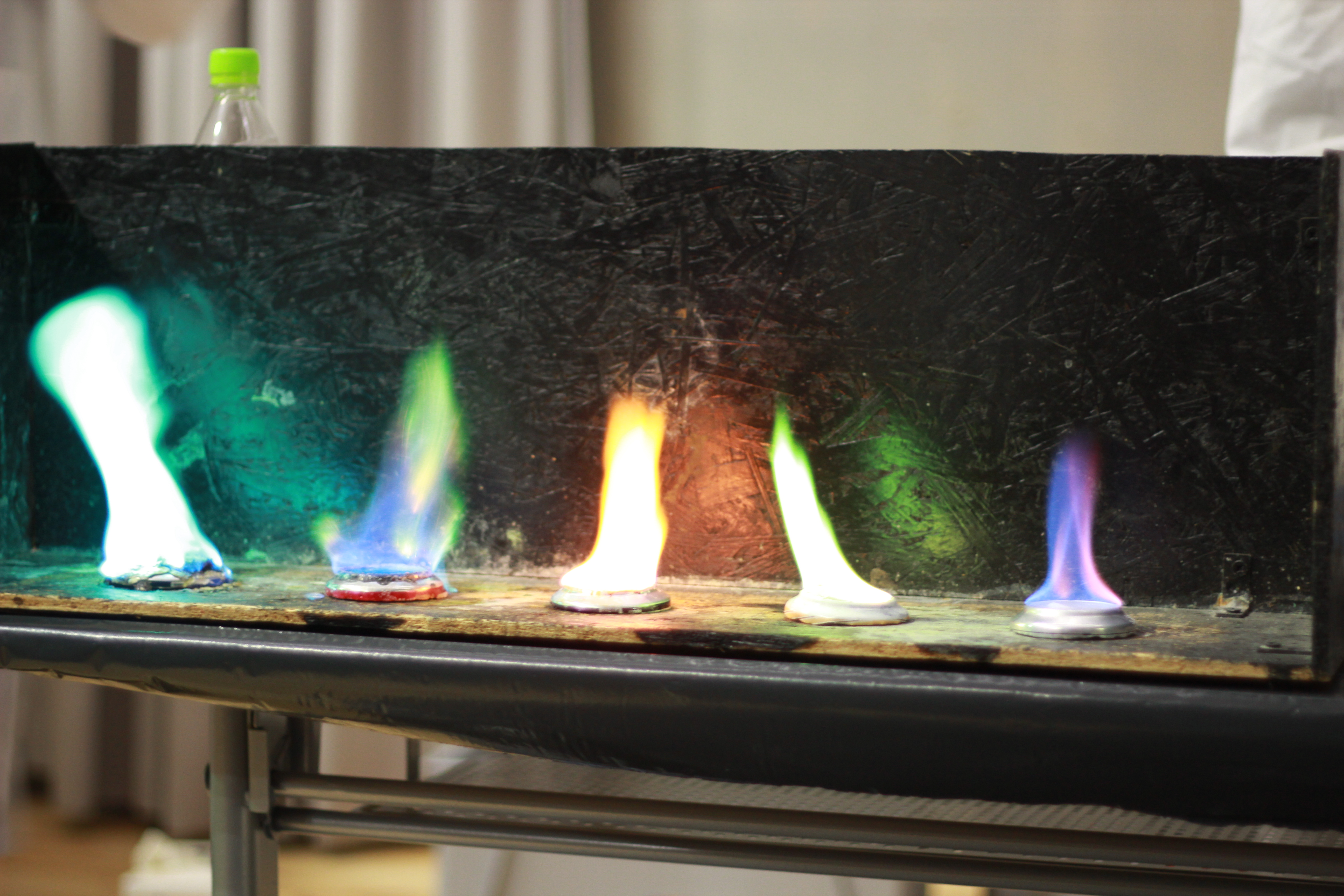 Erinevate soolade leegid